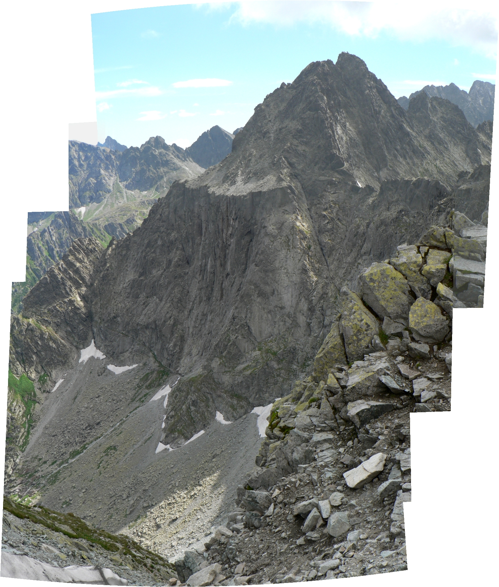 Gánok, pohled od sedla Váhy.